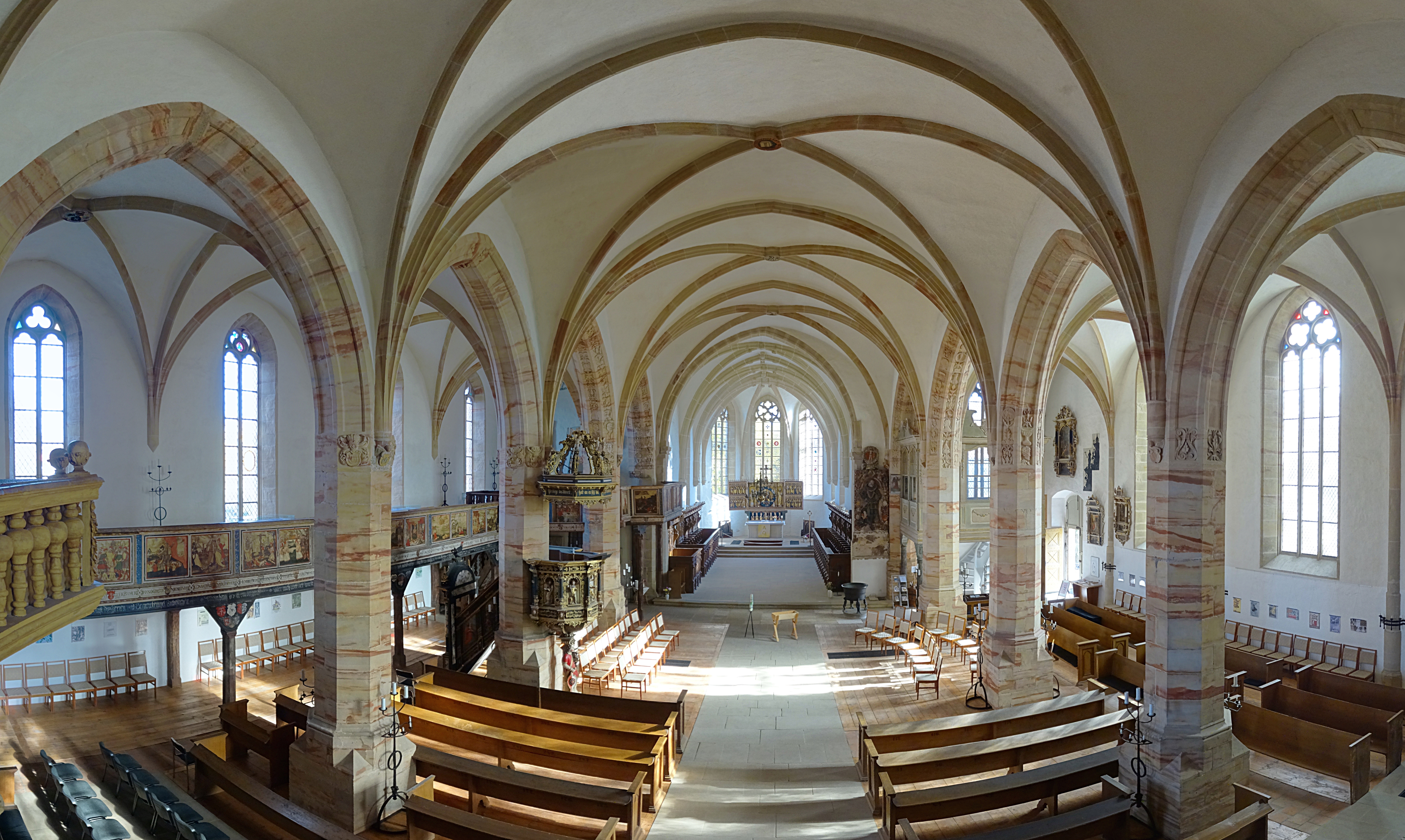 Innenraum Panorama, Blick von der Orgel nach Osten in St. Stephani (Osterwieck)